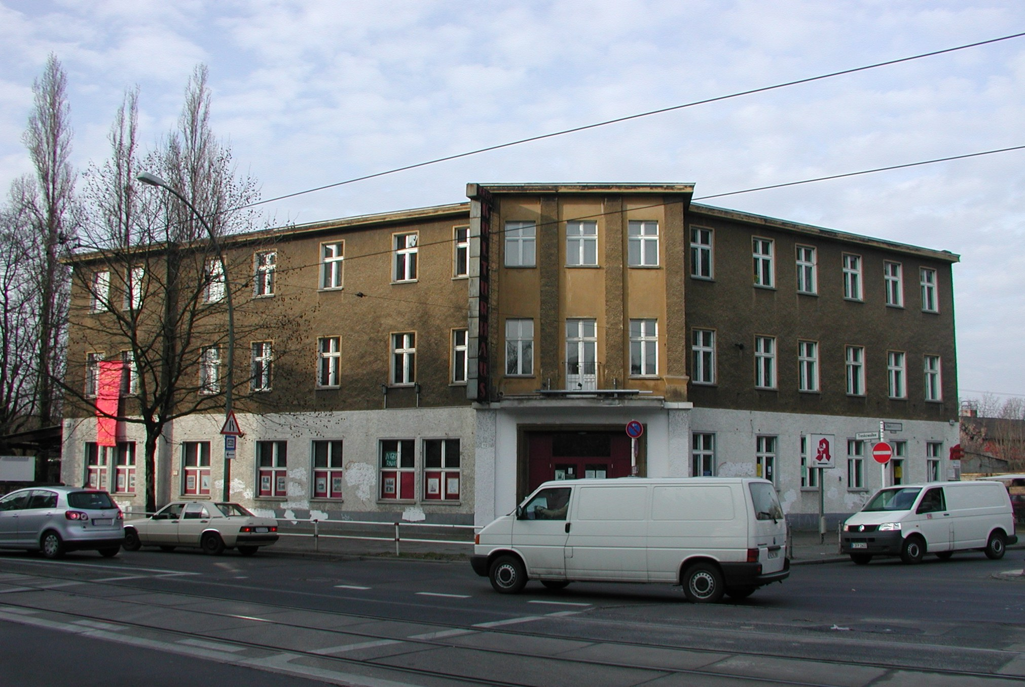 Musikschule (2)